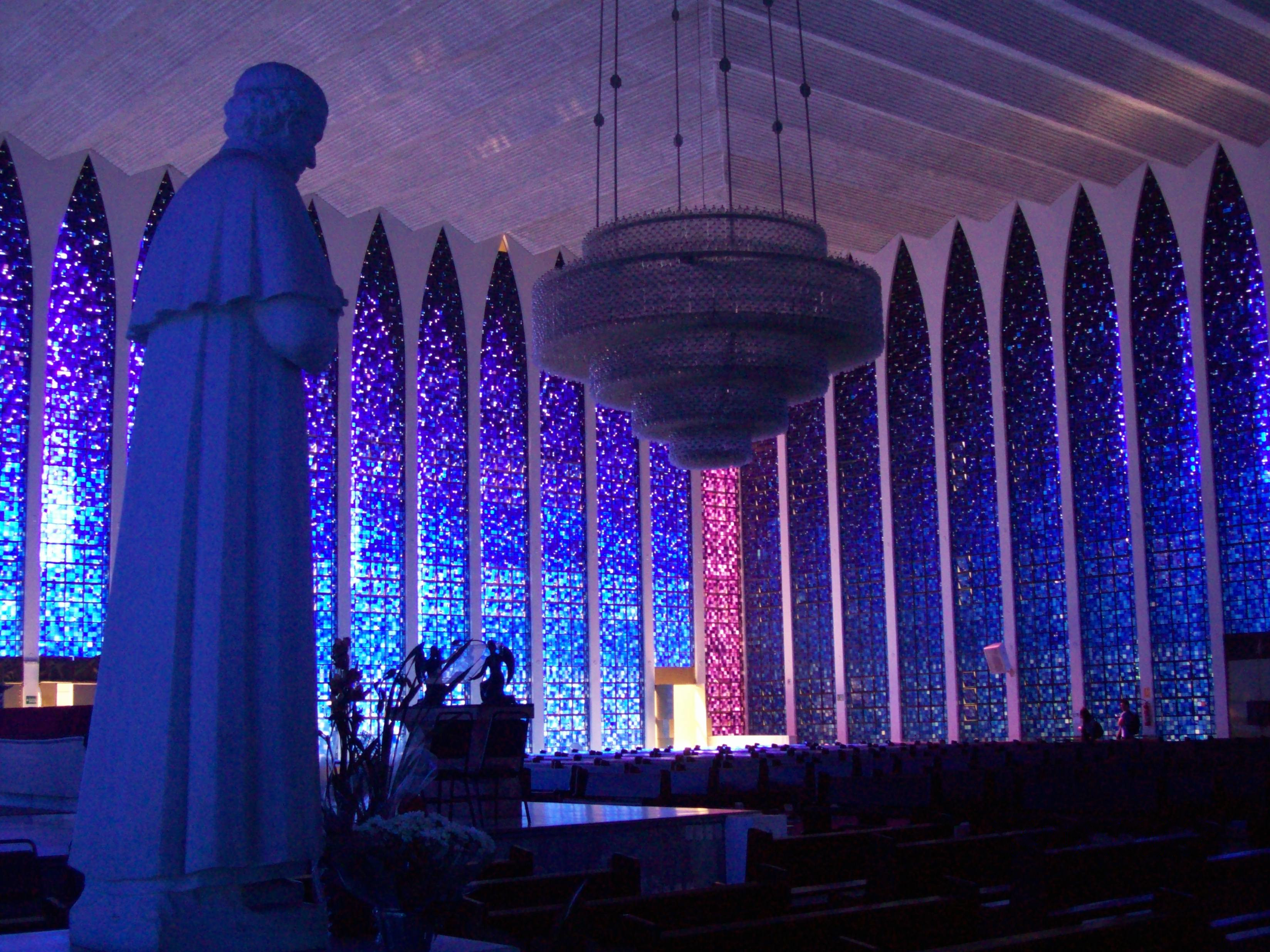 Brasilia DF Brasil - Santuário Dom Bosco